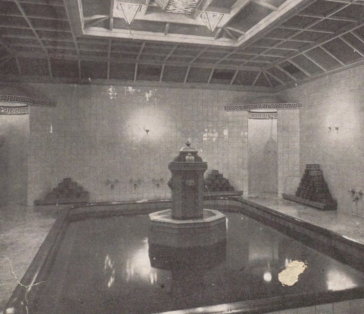 東京駅地下の噴水浴場